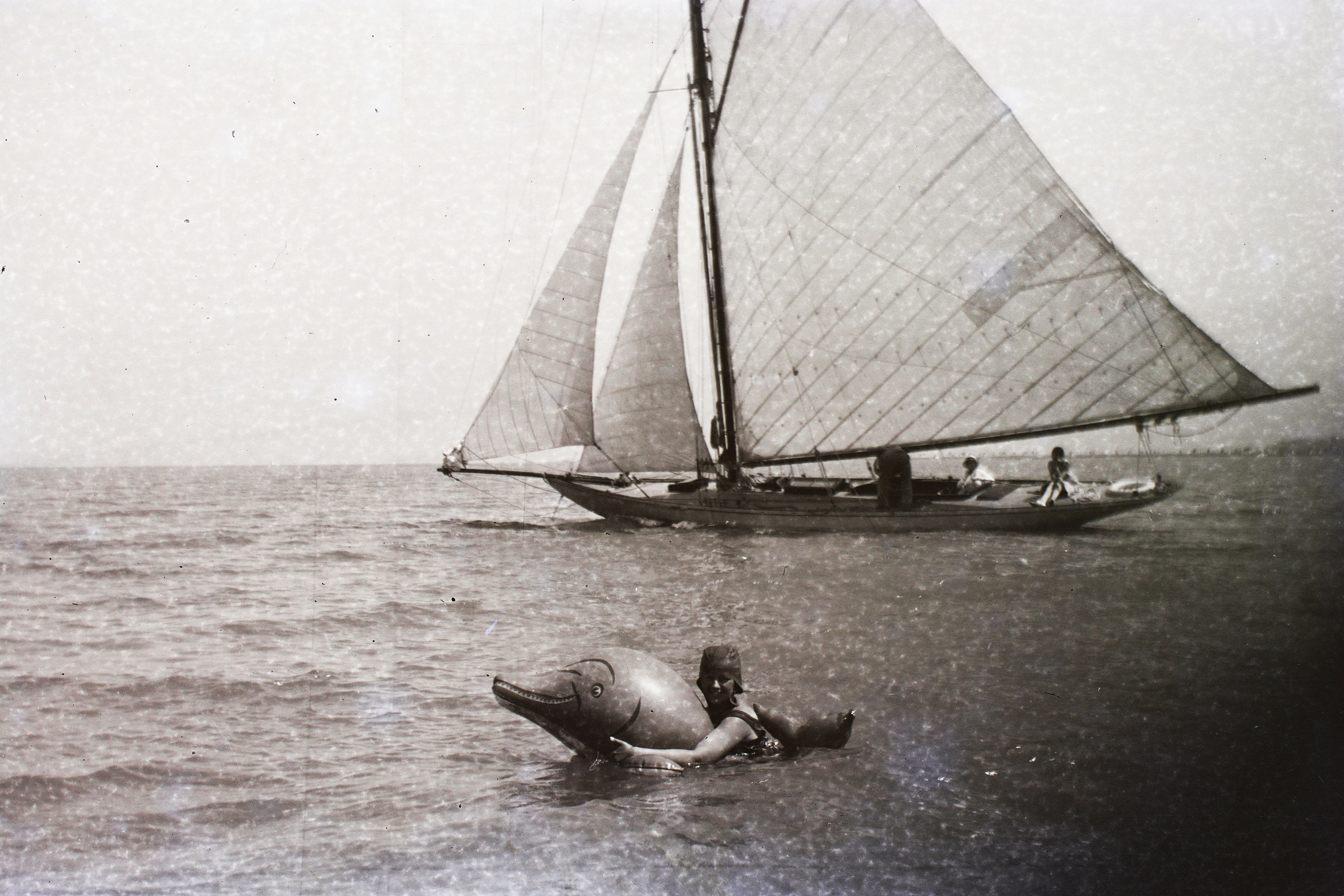 Kishamis vitorláshajó. Location: Hungary, Lake Balaton Tags: sailing, beach stuff Title: Kishamis vitorláshajó.